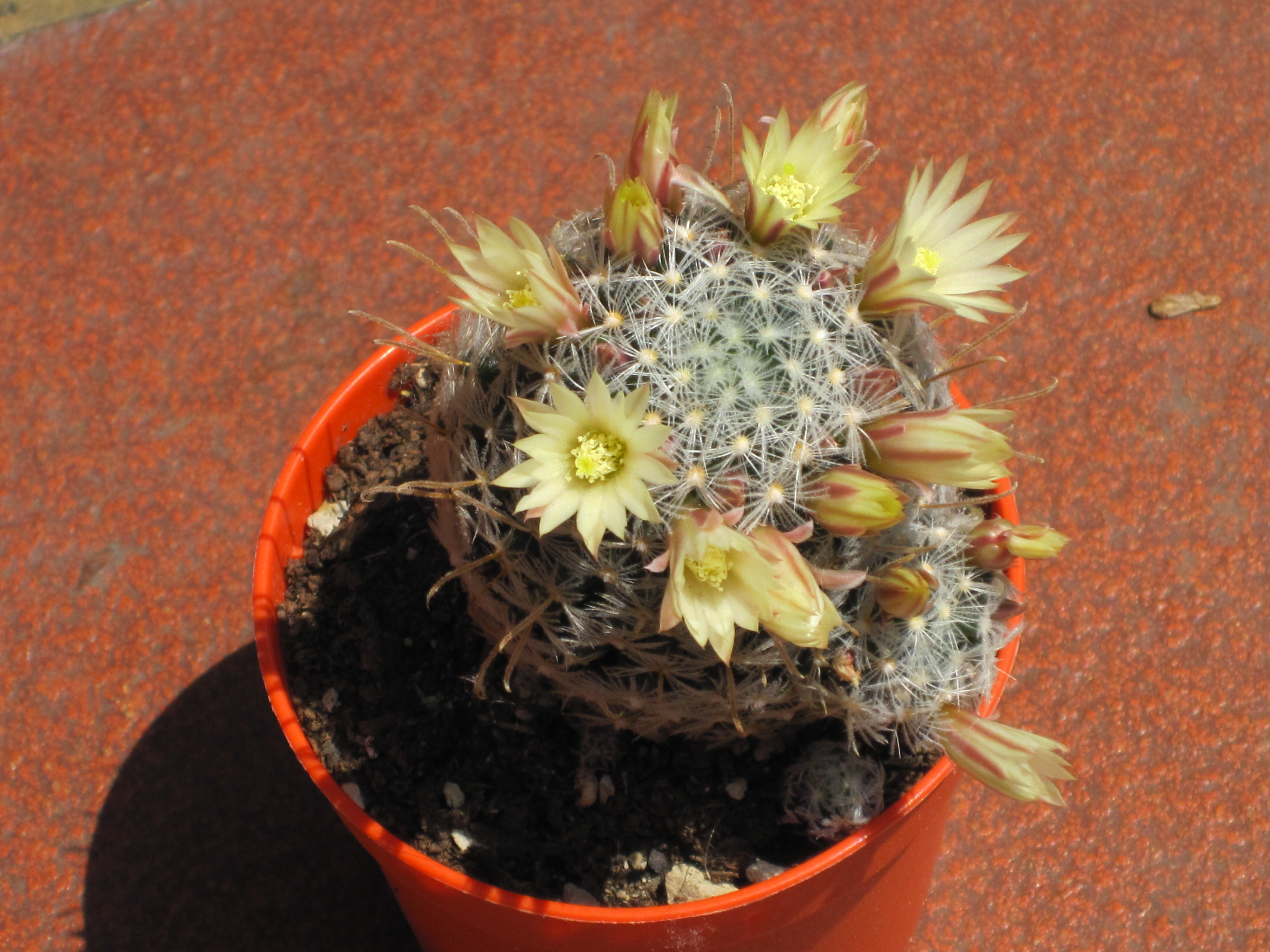 Mammillaria duwei in piena fioritura